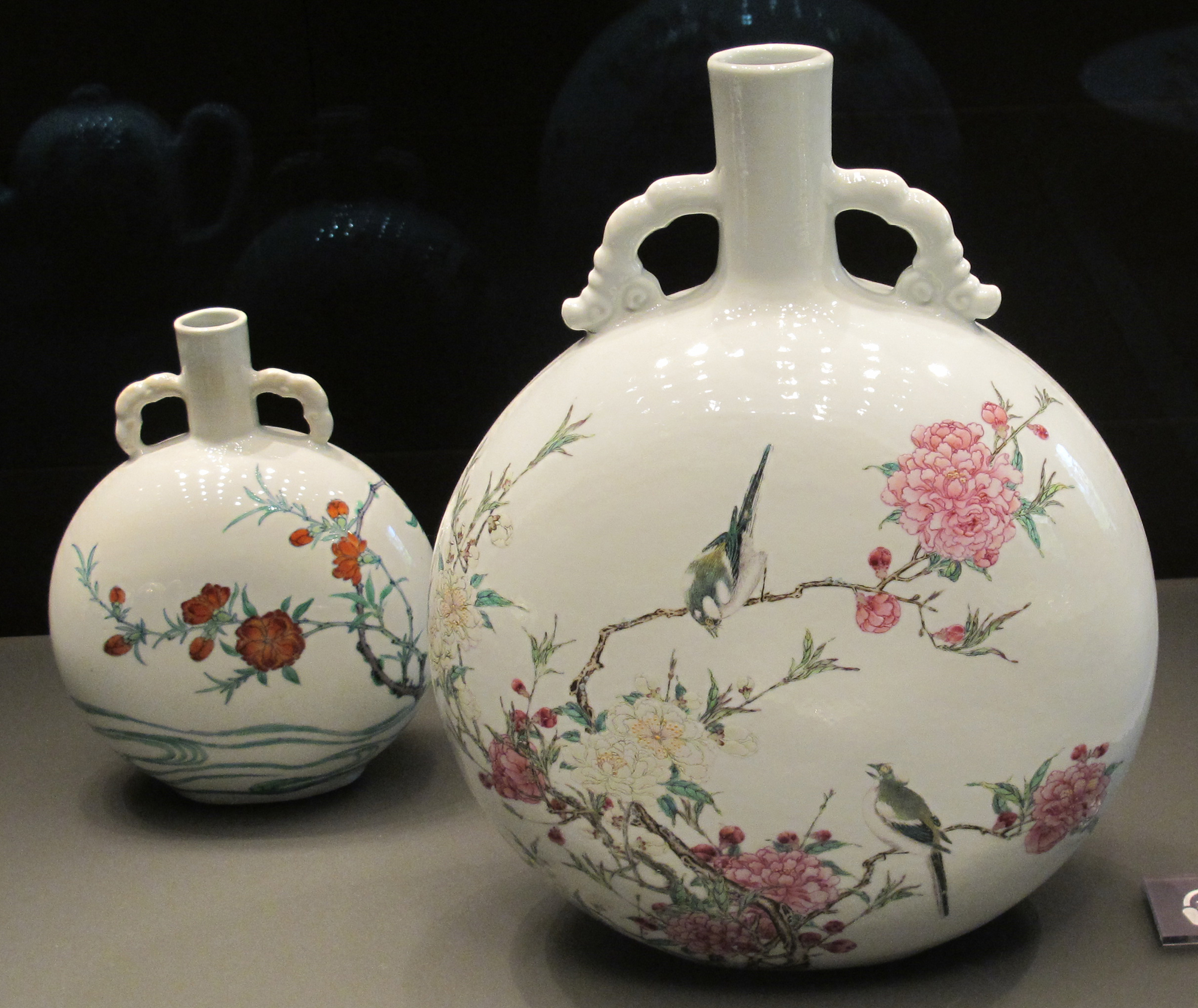 Flacons lune, doucai et fencai, avec des couples d'oiseaux sur des branches fleuries. Jingdezhen. Qing, Période Yongzheng 1723-35. H du plus grand 29,3cmÆnglisc: Moon flasks with pairs of birds on floweing branches. Right flask in fencai, left flask in doucai. Qing, Yongzheng mark, 1723-35. H max 29,3cm